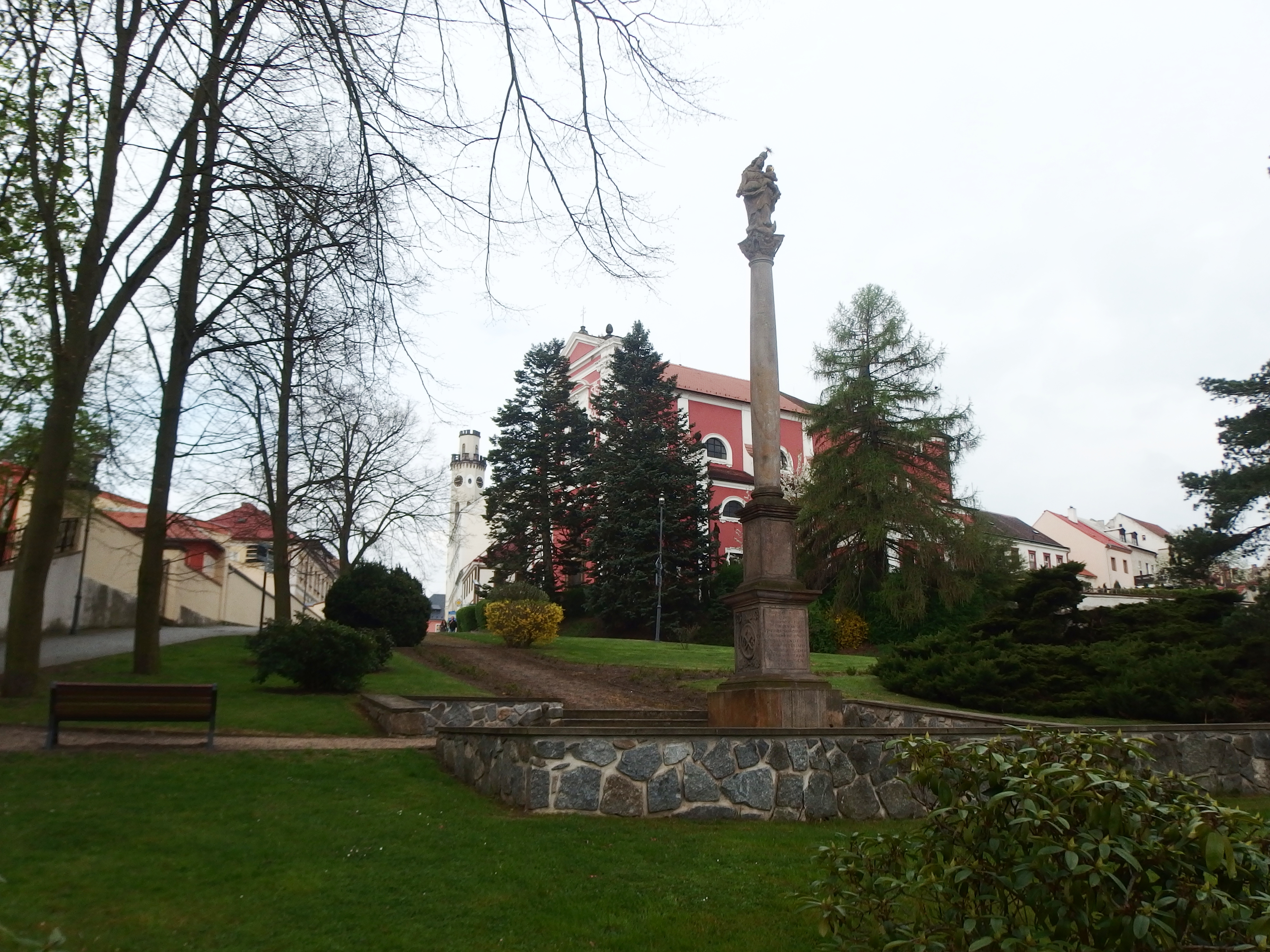 Sloup se sochou Panny Marie, Klášterec nad Ohří.